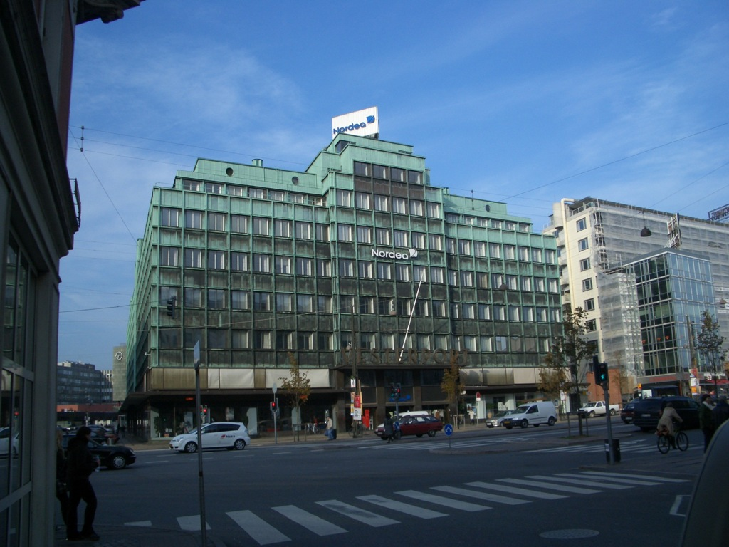 Ved Vesterport, a Functionalist building at Vesterbrogade in Copenhagen, Denmark